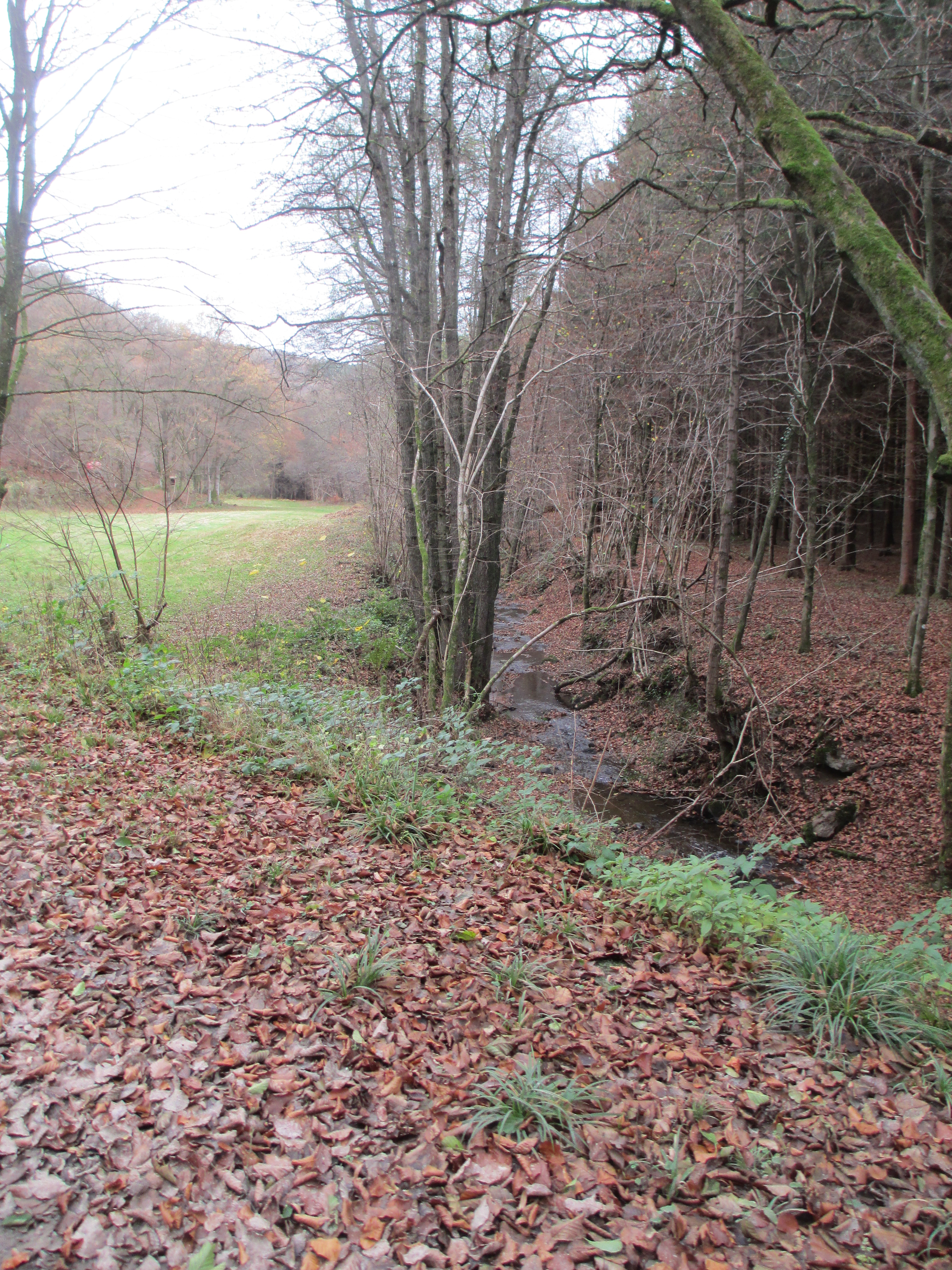 Les zones humides de la vallée du Ru de Chawion abritent des espèces végétales et animales spécifiques. L’homme exploitait auparavant ces riches prairies semi-naturelles. Le foin fauché était de bonne qualité grâce aux alluvions apportées au sol, régulièrement inondé. Depuis l’abandon de ces pratiques ancestrales dans les années 1950, ces prairies n’ont plus été entretenues, certaines étant même plantées de frênes ou enrésinées. Bien que, par un arrêté ministériel de 1991, 1,5 ha de terrains appartenant à la Région wallonne fût constitué en réserve naturelle, la qualité biologique de cette partie de la forêt de Staneux régressait. En été 2015, après une enquête publique, la réserve a été officiellement classée en « réserve naturelle domaniale du Ru de Chawion » et étendue à 11 ha d’espace protégé. C’est l’assurance d’une prise en charge stricte et immédiate par la Division Nature et Forêt de la Région wallonne, Cantonnement de Spa. L’extraordinaire biodiversité de la zone renaît déjà. Le colchique, le martin-pêcheur et le cingle plongeur, le triton, le castor aussi, le papillon demi-deuil en deviennent des hôtes familiers grâce aux travaux d’aménagement commencés. Un fond de vallée plus ouvert, des sapins abattus, des mares préservées ou créées sculptent le paysage : ce sera un travail d’une génération. La présence humaine y est strictement limitée sur les chemins et la cueillette interdite. La circulation motorisée n'y est pas la bienvenue.